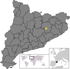 Localització de Vic. Location of Vic in Catalonia.